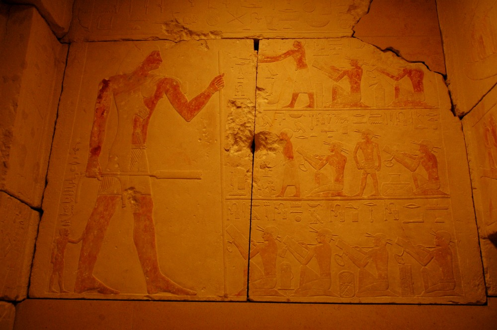 Die Kultkammer des Ka-ni-nisut im Kunsthistorischen Museum Wien von der Mastaba des Ka-ni-nisut aus Giza, Grabung Hermann Junker 1913. Nordwand mit der grossen Darstellung des Grabbesitzers. Inv.Nr. 8006